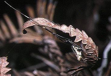 female Argyrodes kumadai from Okinawa.